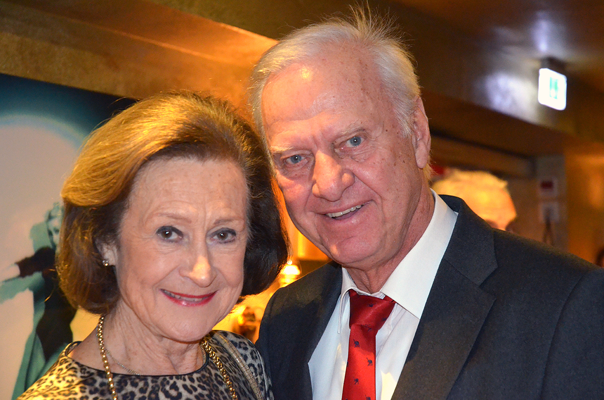 {Zum 10-jährigen Bestehen der Ricarda und Udo Niedergerke Stiftung luden die Stiftungsgründer am 22. Oktober 2018 zum alljährlichen Benefizabend zu Gunsten der medizinischen Versorgung von Wohnungs- und Obdachlosen sowie von Menschen in Not. Der musikalisch-artistische Abend im GOP Varieté-Theater Hannover, bei dem die sämtliche Künstler ehrenamtlich auftraten, stand unter der Schirmherrschaft des niedersächsischen Ministerpräsidenten Stephan Weil, der zugleich zu den geladenen Gästen zählte ...